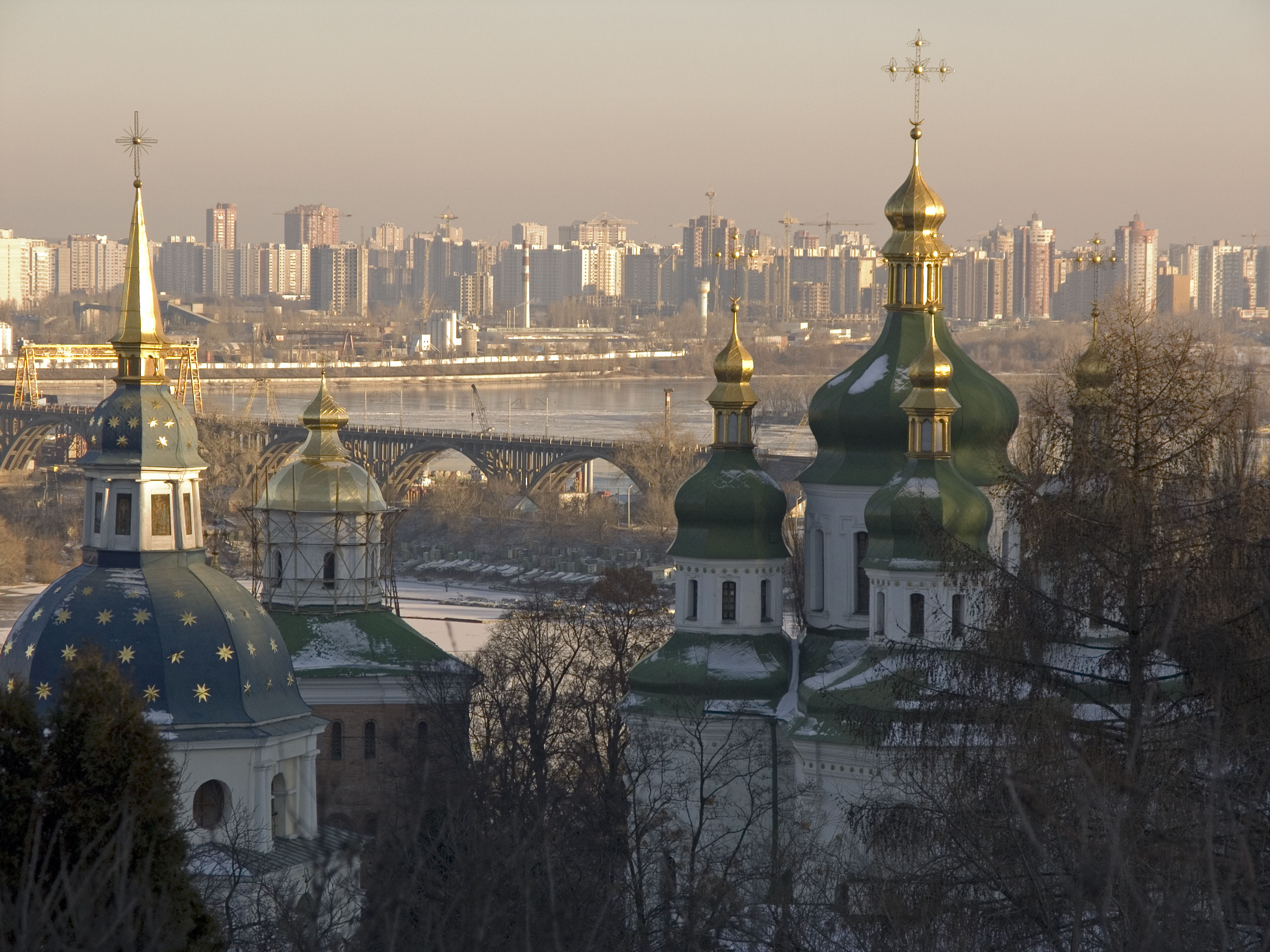 Україна, Київ - Свято-Михайлівський Видубицький монастир - Собор Георгіївський